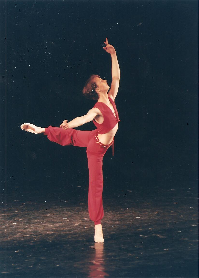 balett